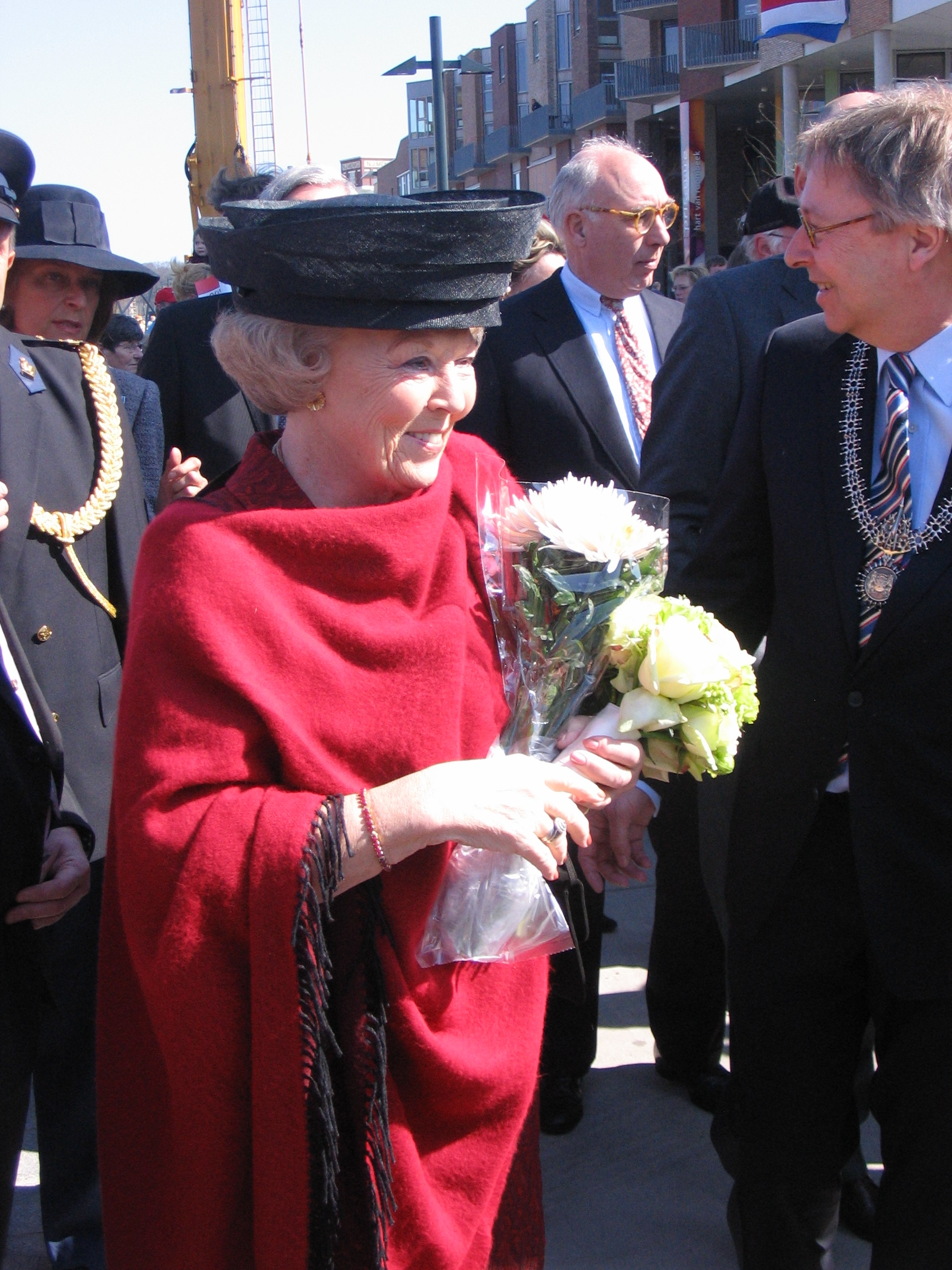 Koningin Beatrix is aanwezig in de hernieuwde wijk Roombeek, en opent het cultuurcentrum Het Rozendaal. Rechts van haar burgemeester Peter den Oudsten.